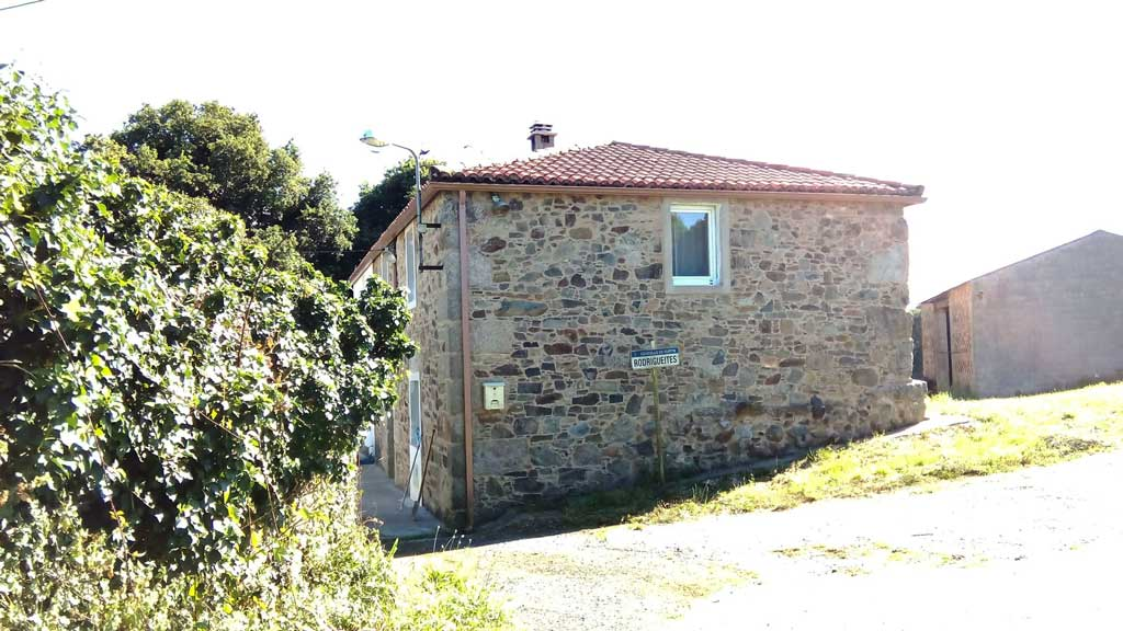 Vista de Rodrigueites, Curtis.